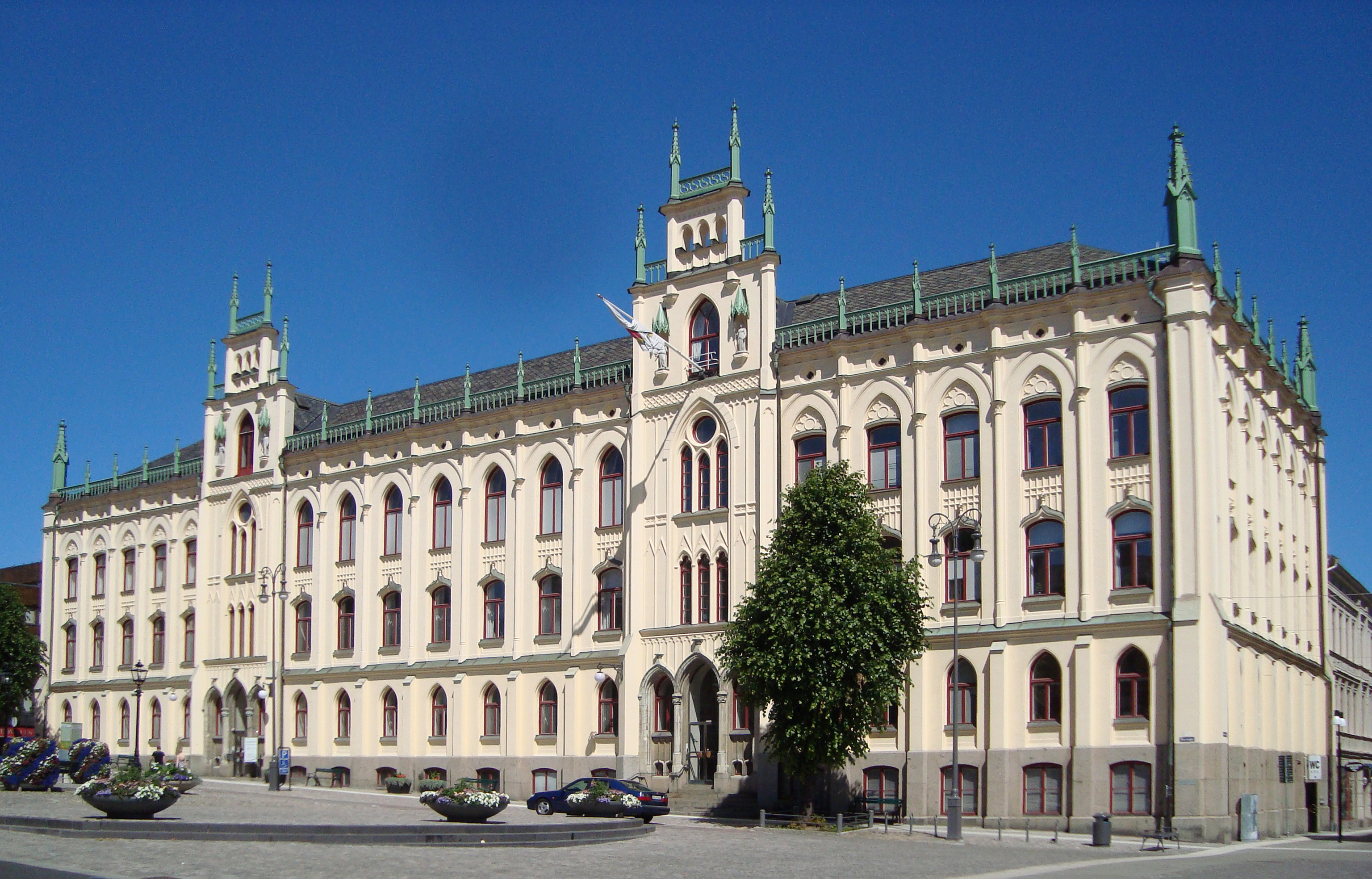 Rådhuset i Örebro, Sverige